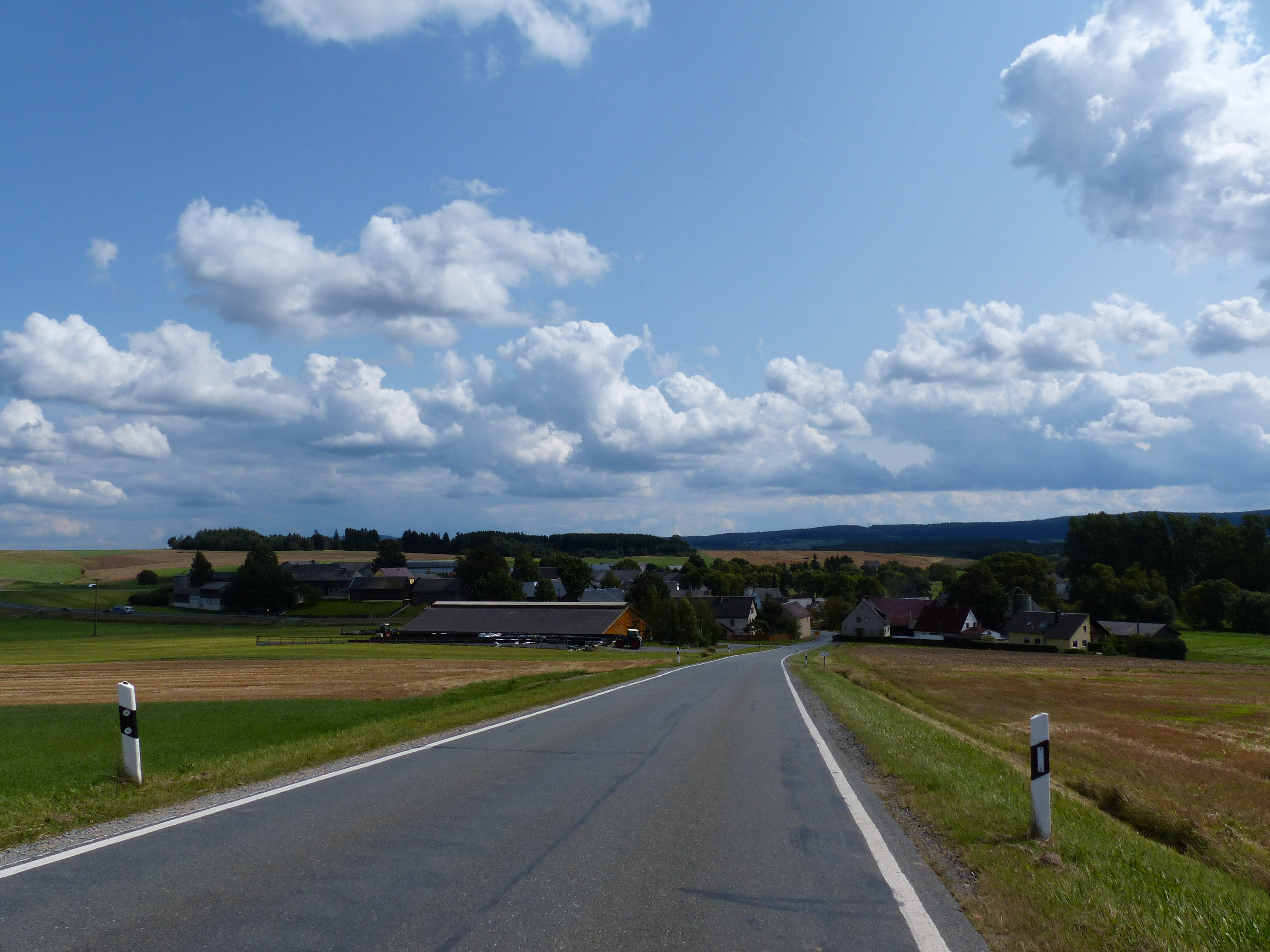 Ansicht von Seulbitz